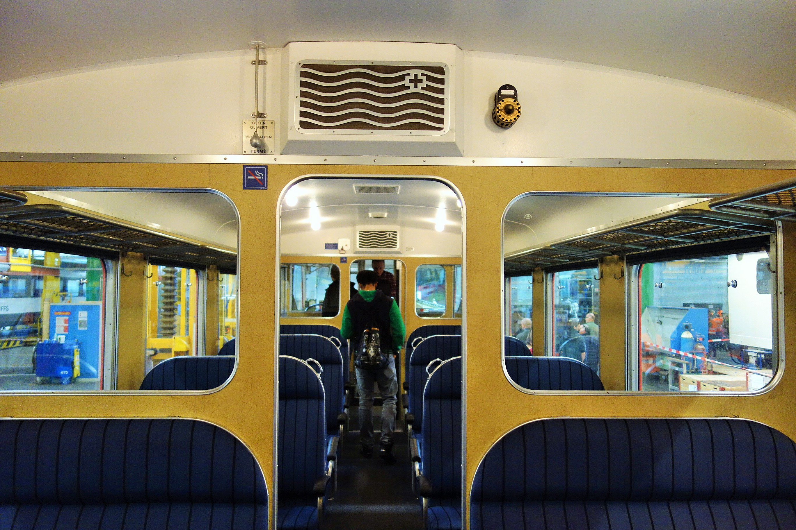 SBB Industriewerk Olten, Schweiz: Tag der offenen Tür 30. März 2019